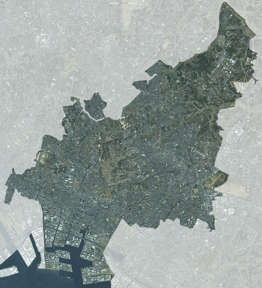 船橋市域の衛星画像